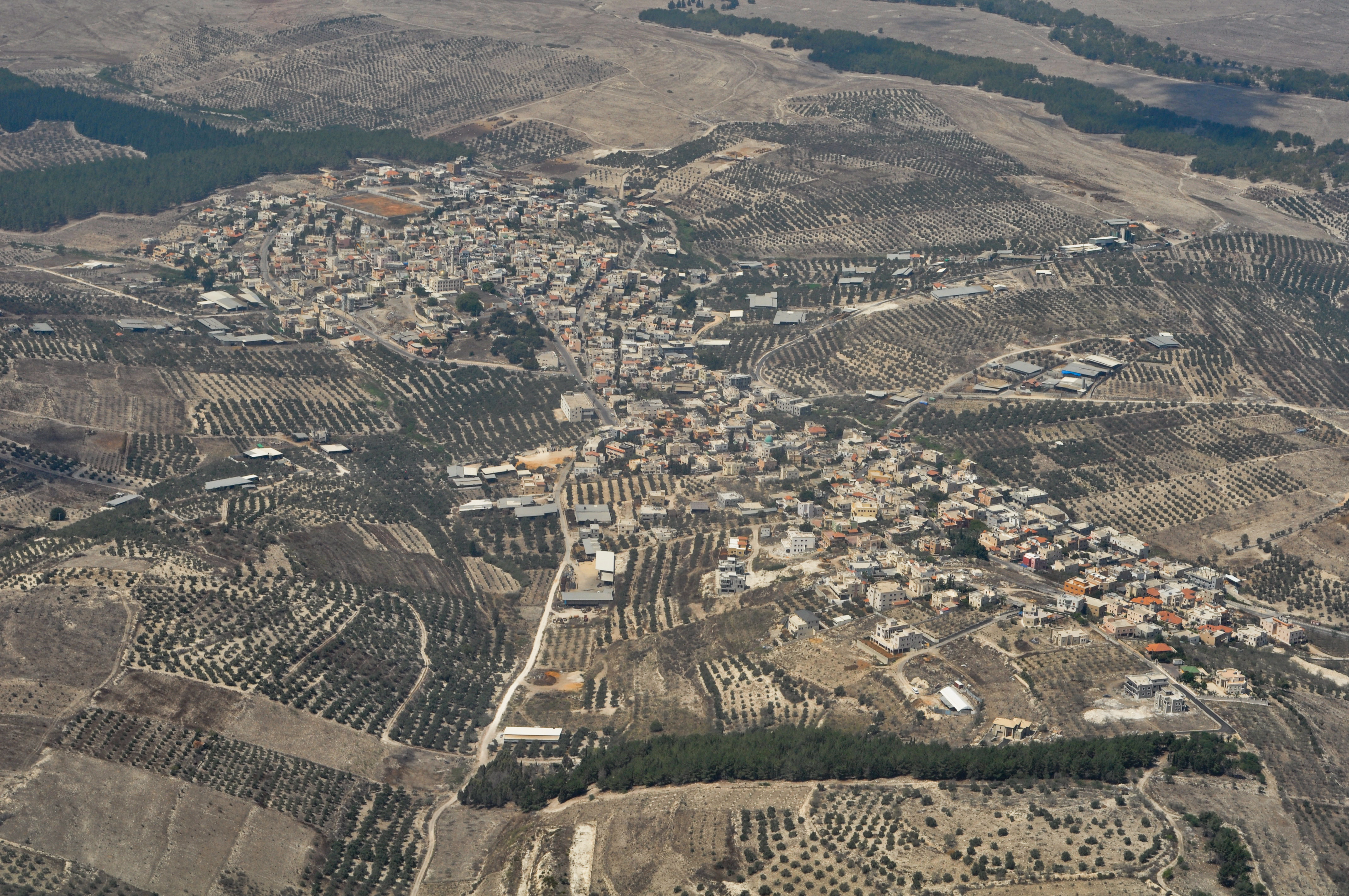 בסמ"ה ומועאוויה